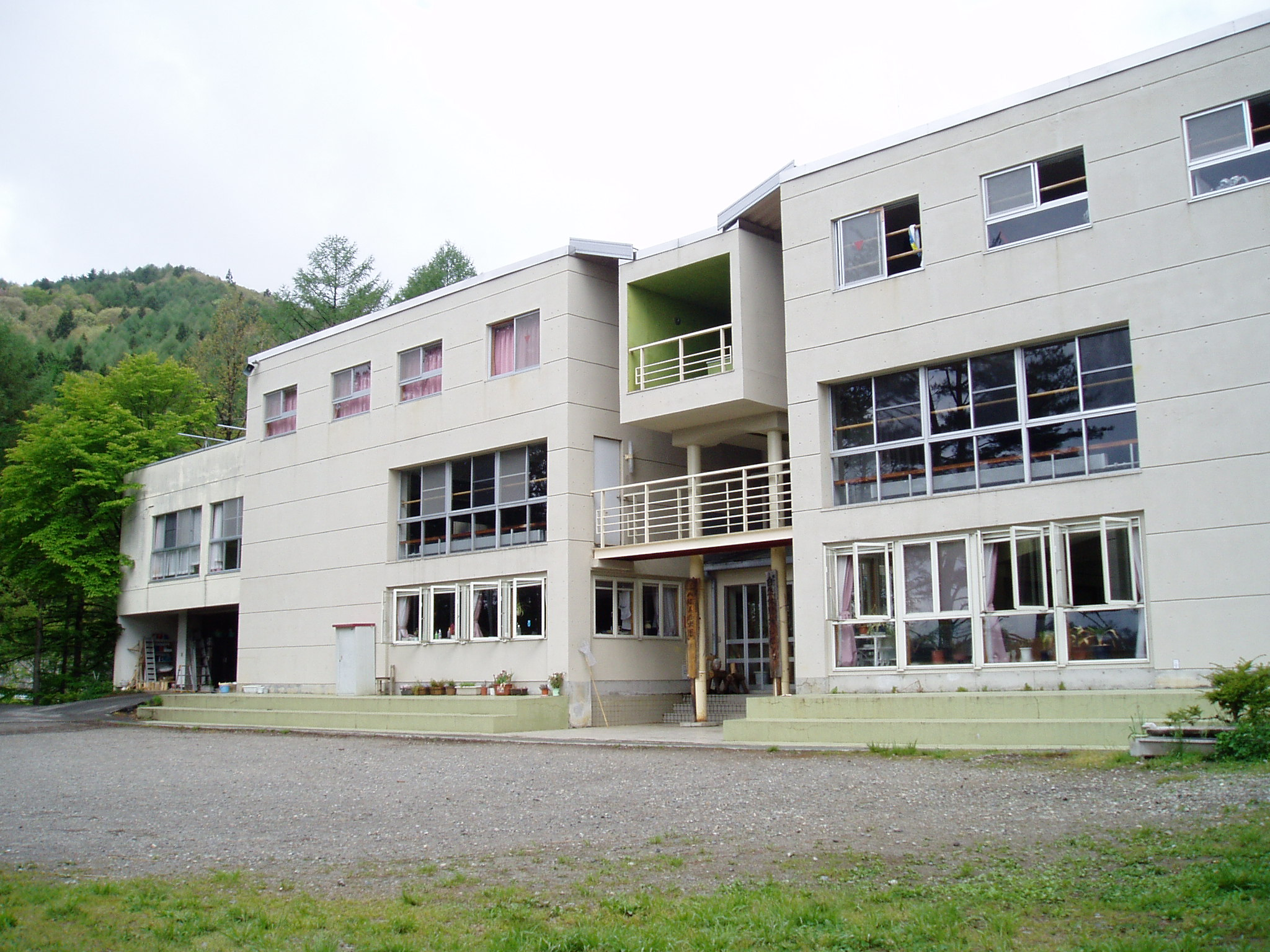 育てる会の施設。所在地は、長野県大町市八坂8594-ロ。